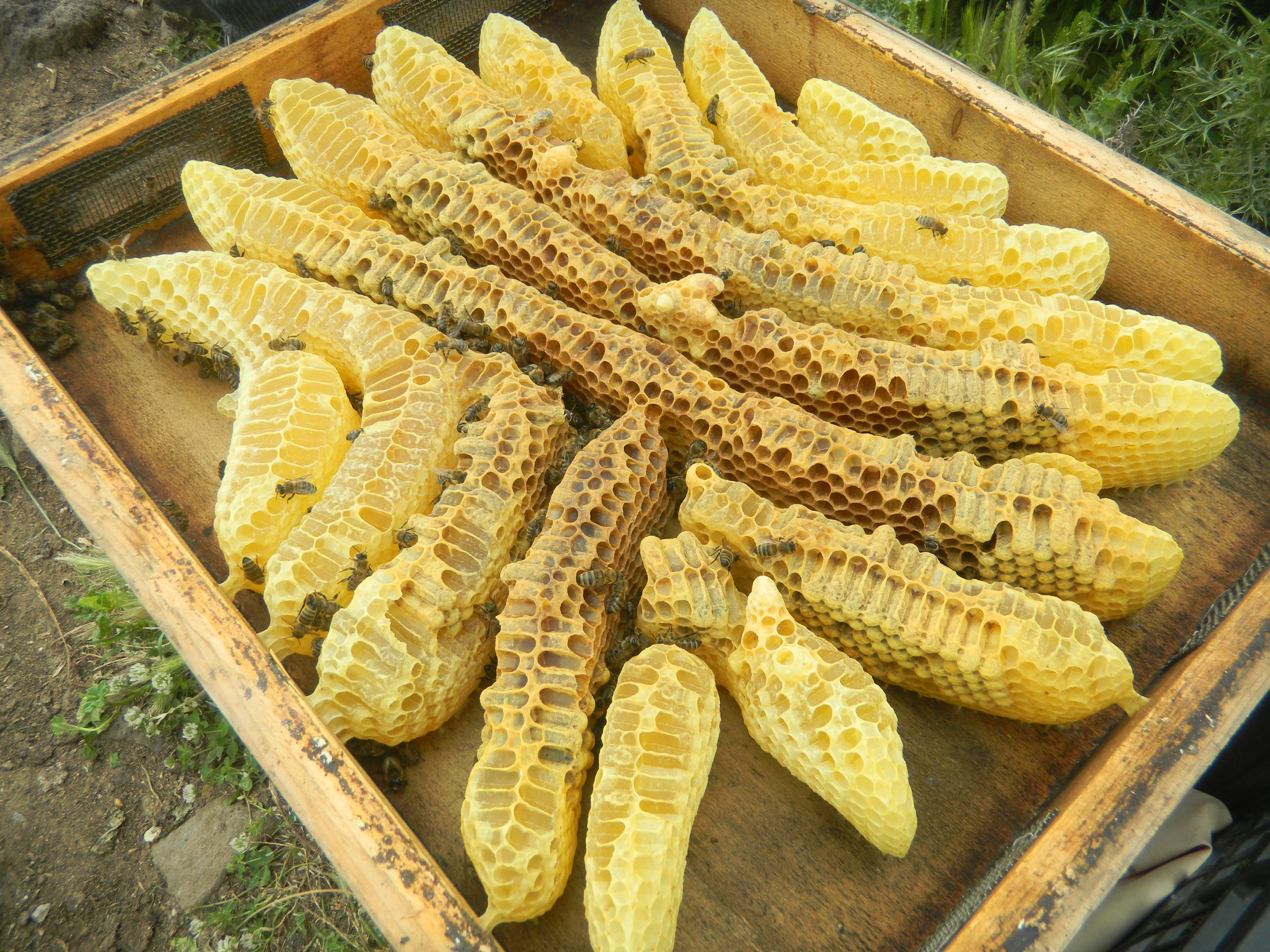 Honig - μέλι aus Mesotopos